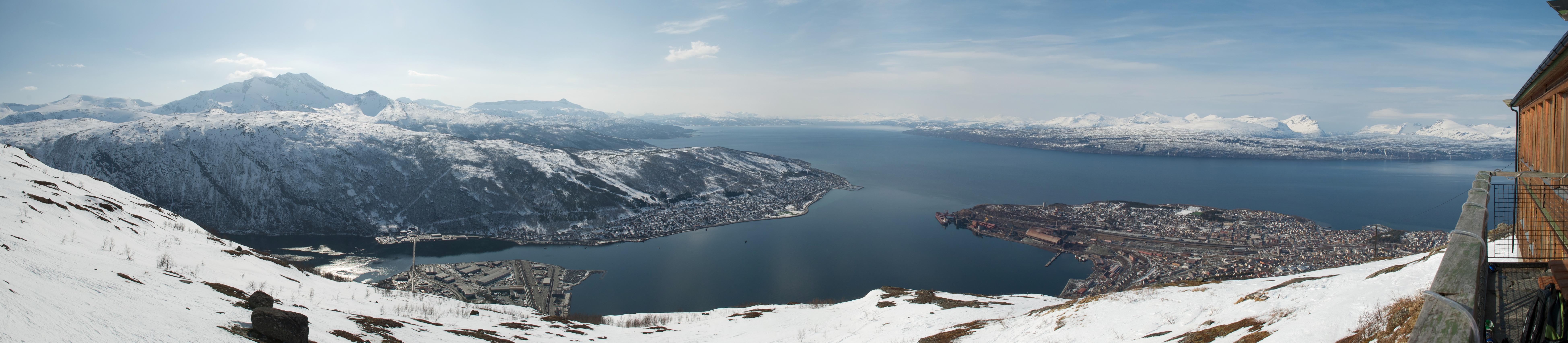 Ofotfjorden og Narvik frå Fagernesfjellet